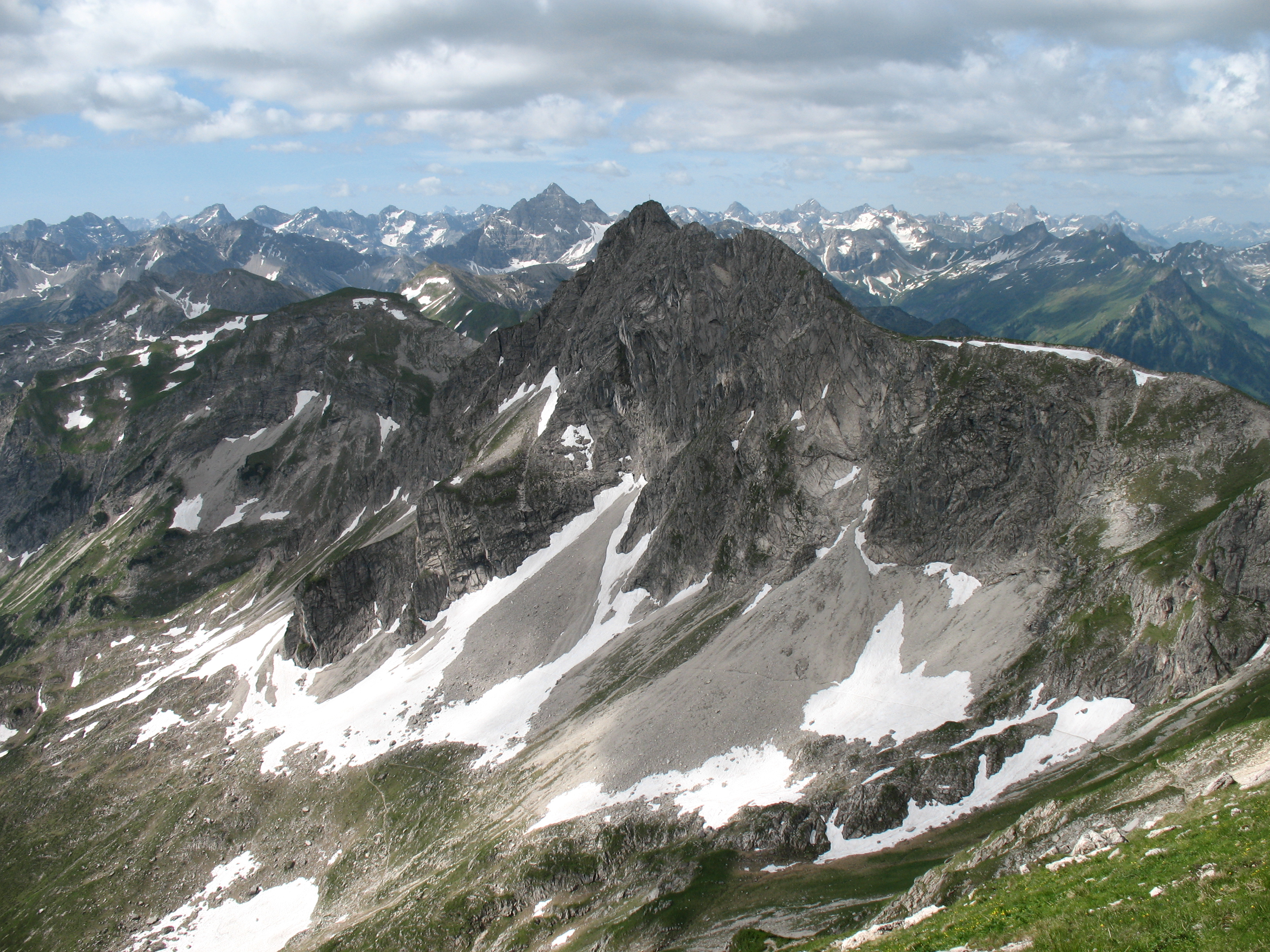 Blick vom Gaishorn (2247 m) auf das Rauhhorn (2240 m). Dahinter sind die wichtigsten Gipfel der Allgäuer Alpen zu erkennen, darunter Hochvogel (2592 m), Großer Krottenkopf (2656 m), Mädelegabel (2645 m), Trettachspitze (2595 m) und Höfats (2259 m).